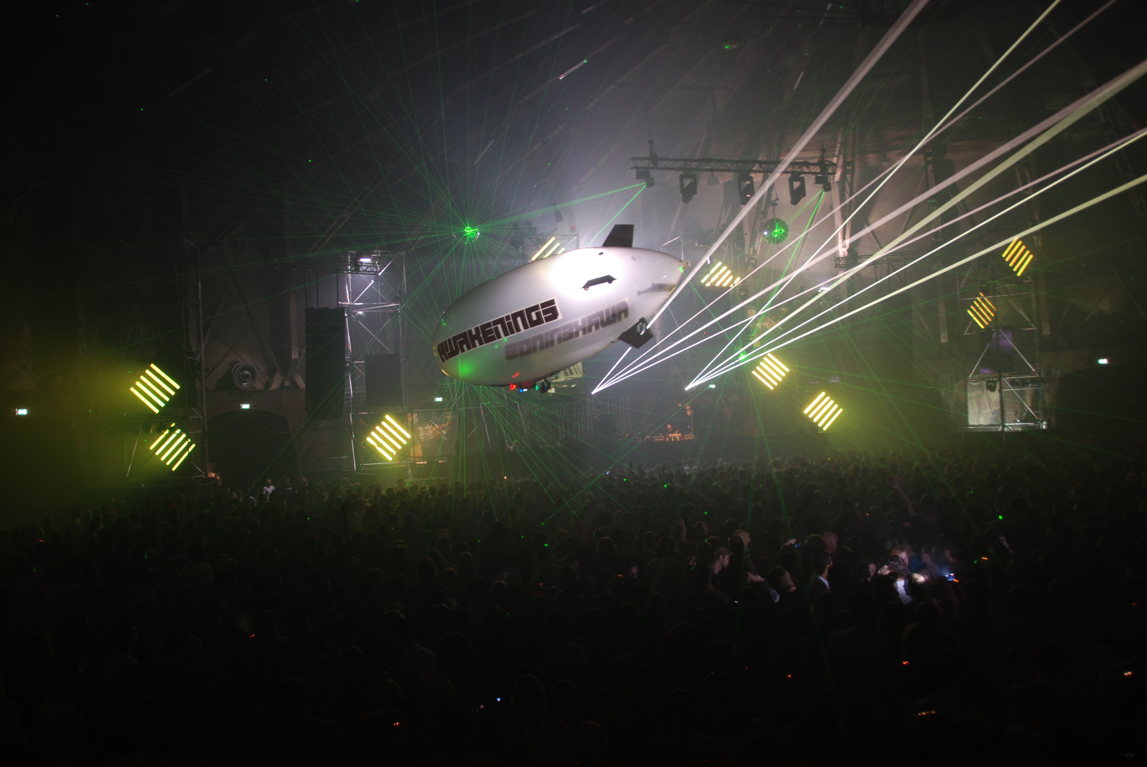 voor de Staatskrant